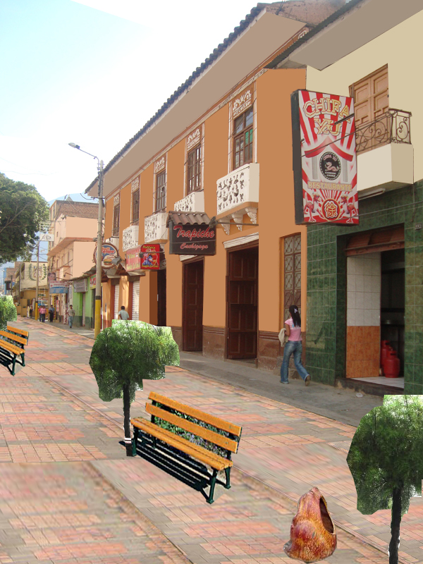 fotografia 5-5